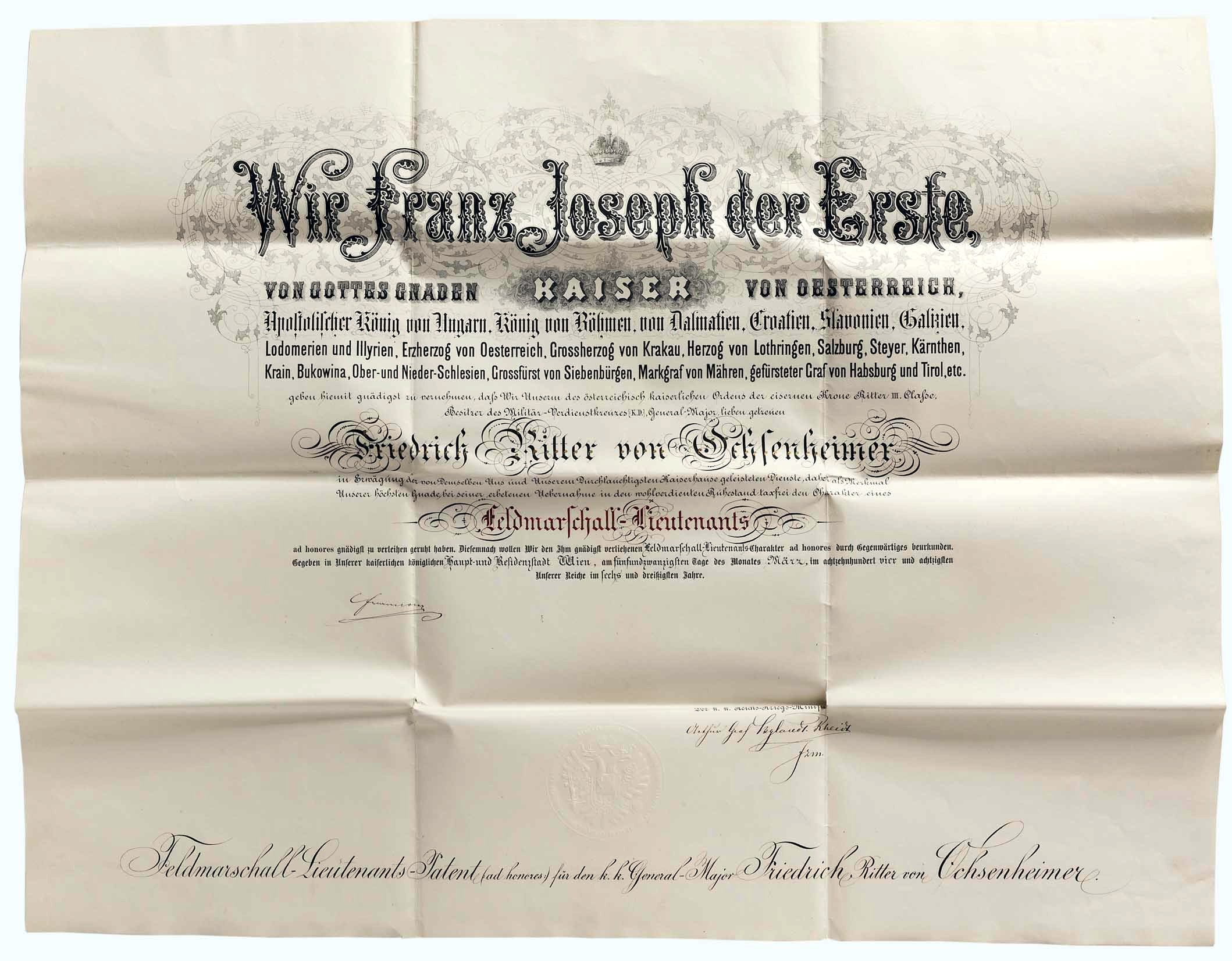 Patent anläßlich der Ernennung zum Feldmarschall-Lieutenant ad honores für den pensionierten k.u.k. Generalmajor Friedrich Ritter von Ochsenheimer (1873 als Ritter des Ordens der Eisernen Krone III. Klasse in den erblichen Ritterstand erhoben). Ausgestellt Wien, 25. März 1884, mit eigenhändiger Unterschrift von Franz Joseph I. (Kaiser von Österreich 1848-1916) und Gegenzeichnung des Kriegsministers. Papierurkunde (Format 66 x 83 cm) mit lithographiertem Text und handschriftlichen Ergänzungen.